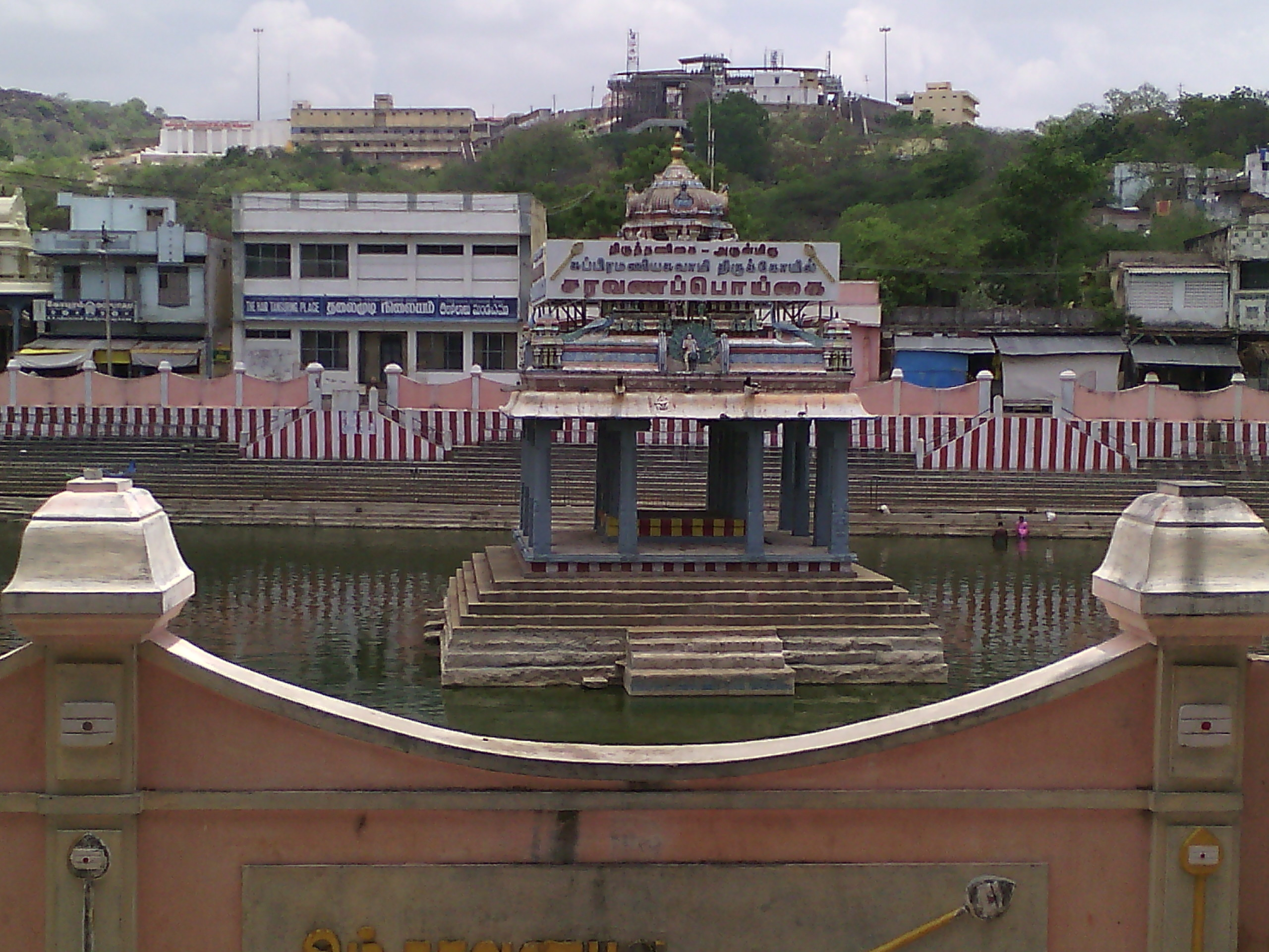 திருத்தணி முருகன் கோயில்